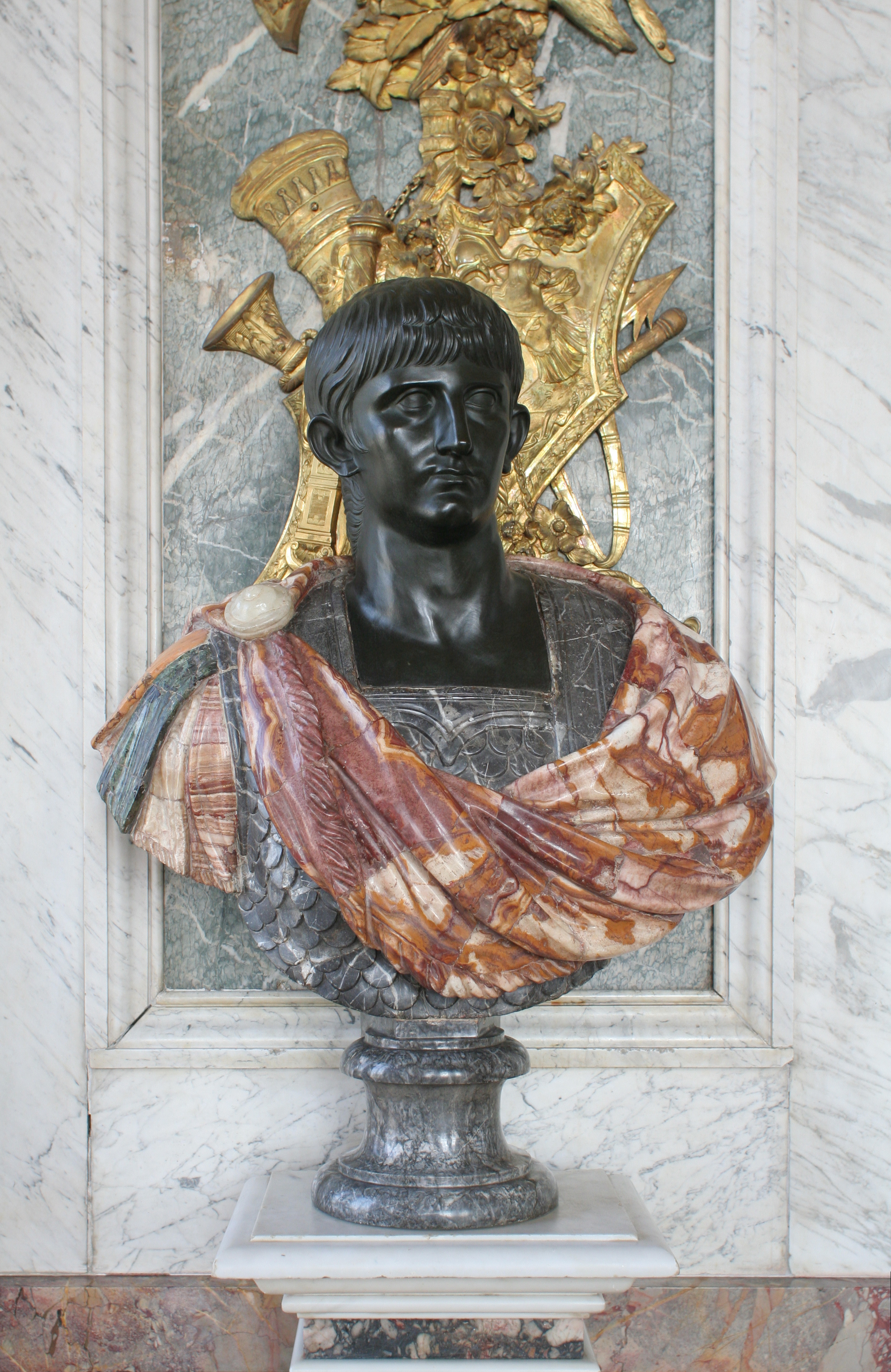 Château de Versailles, salon de la paix, buste de l'empereur romain Claude en bronze et marbre.Numéro d'inventaire : MV8511 Height: 0.9 m (37 in) dimensions QS:P2048,0.94U11573 sculpture on marble, sculpture on bronze